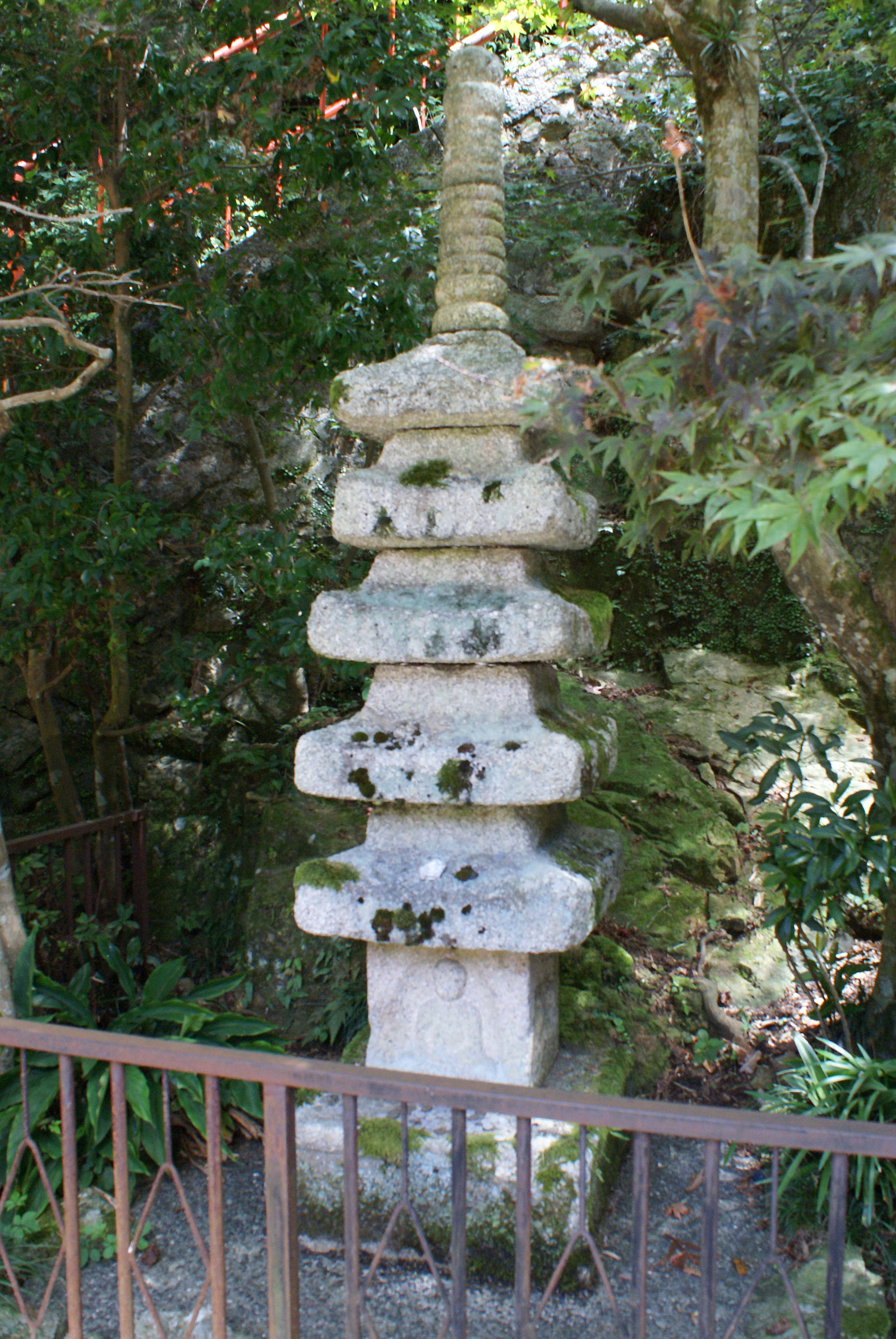 Hogonji in Nagahama, Shiga, Japan